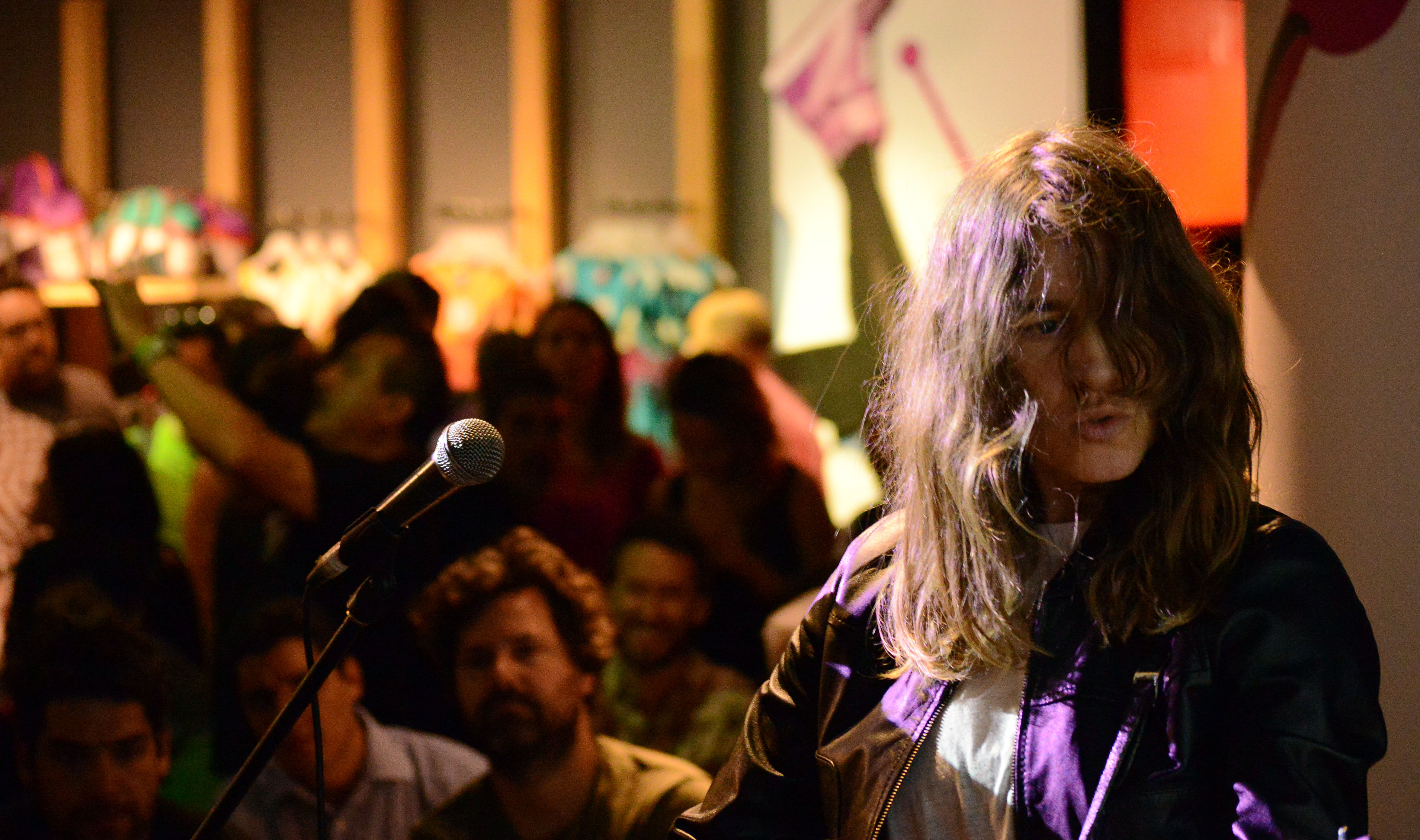 EXPO “Diagrama” X Tan Vargas / Música en Vivo X Colombina Parra